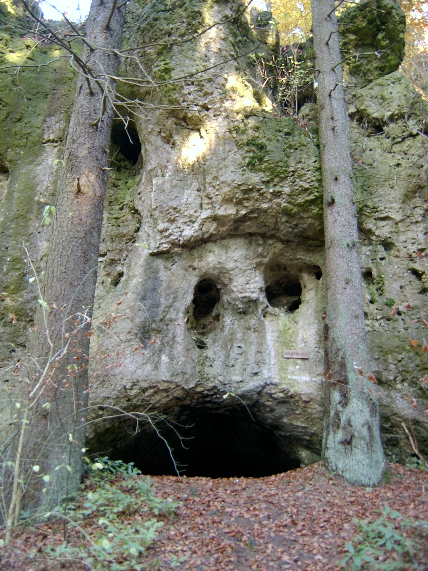 Wirrenloch